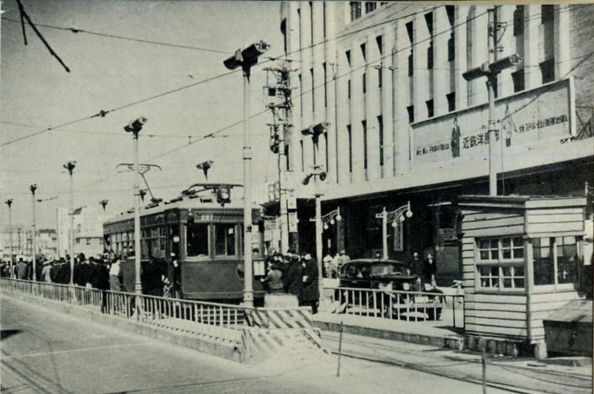 南海上町線「天王寺駅前」駅（二代目）